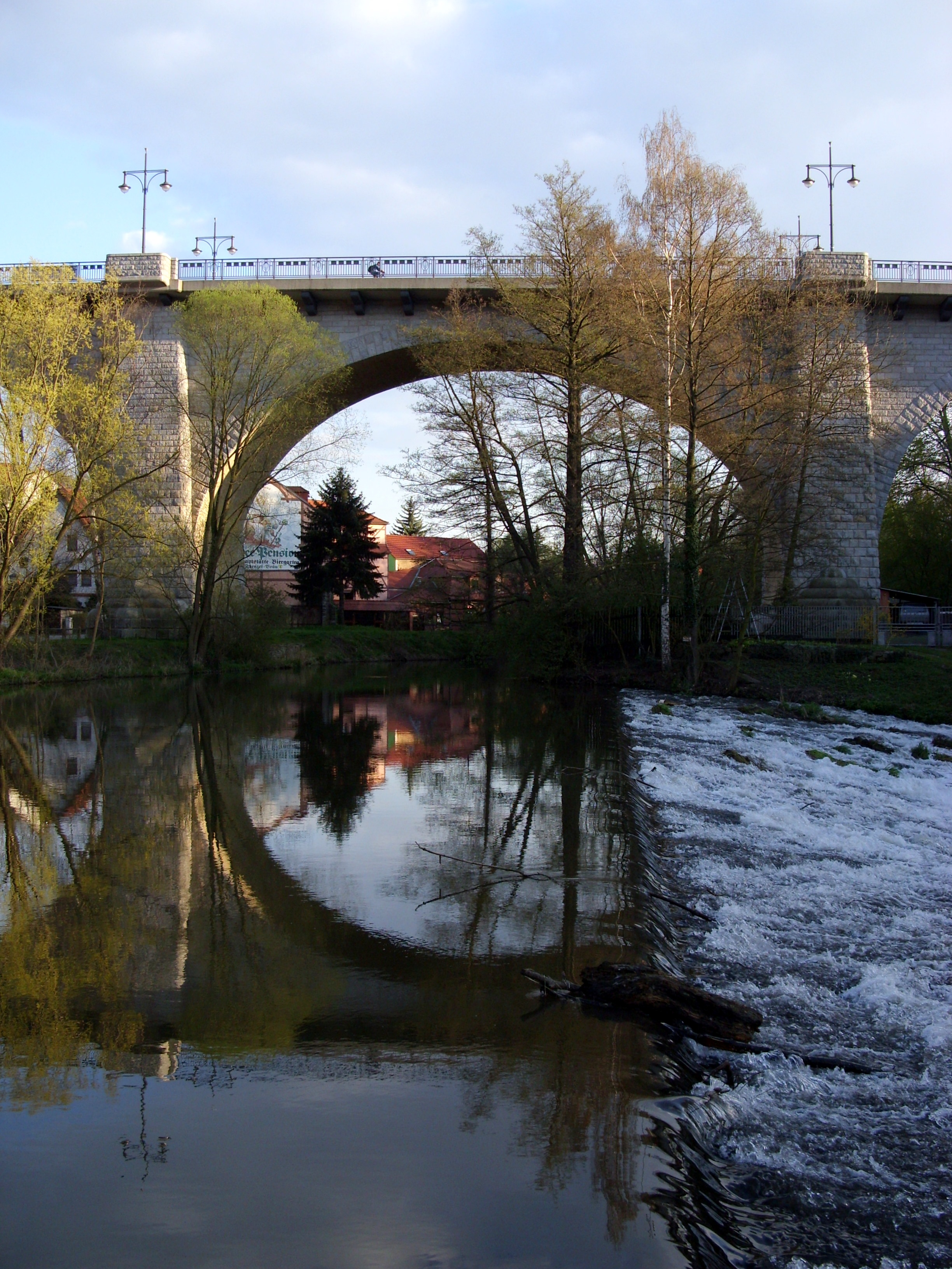 Friedensbrücke und Spree in Bautzen. Hornjoserbsce: Móst měra a Sprjewja w Budyšinje.